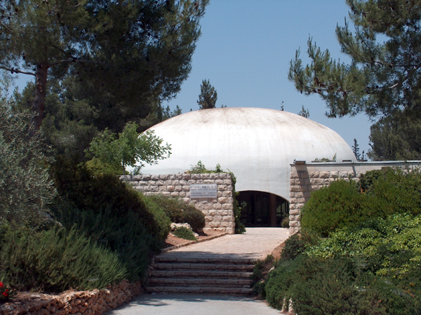 בית הכנסת בגבעת רם בתכנון האדריכלים היינץ ראו ודוד רזניק